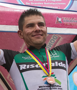 Andrés Miguel Díaz Campeonato Nacional de Ruta - Élite Circuito en Ibagué. 150Km 21 de abril de 2013